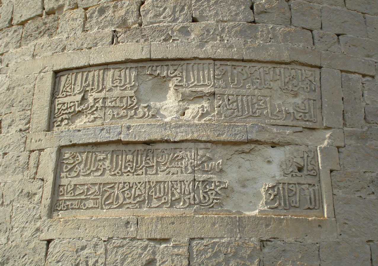 Надпись на круглой башне в Мардакян